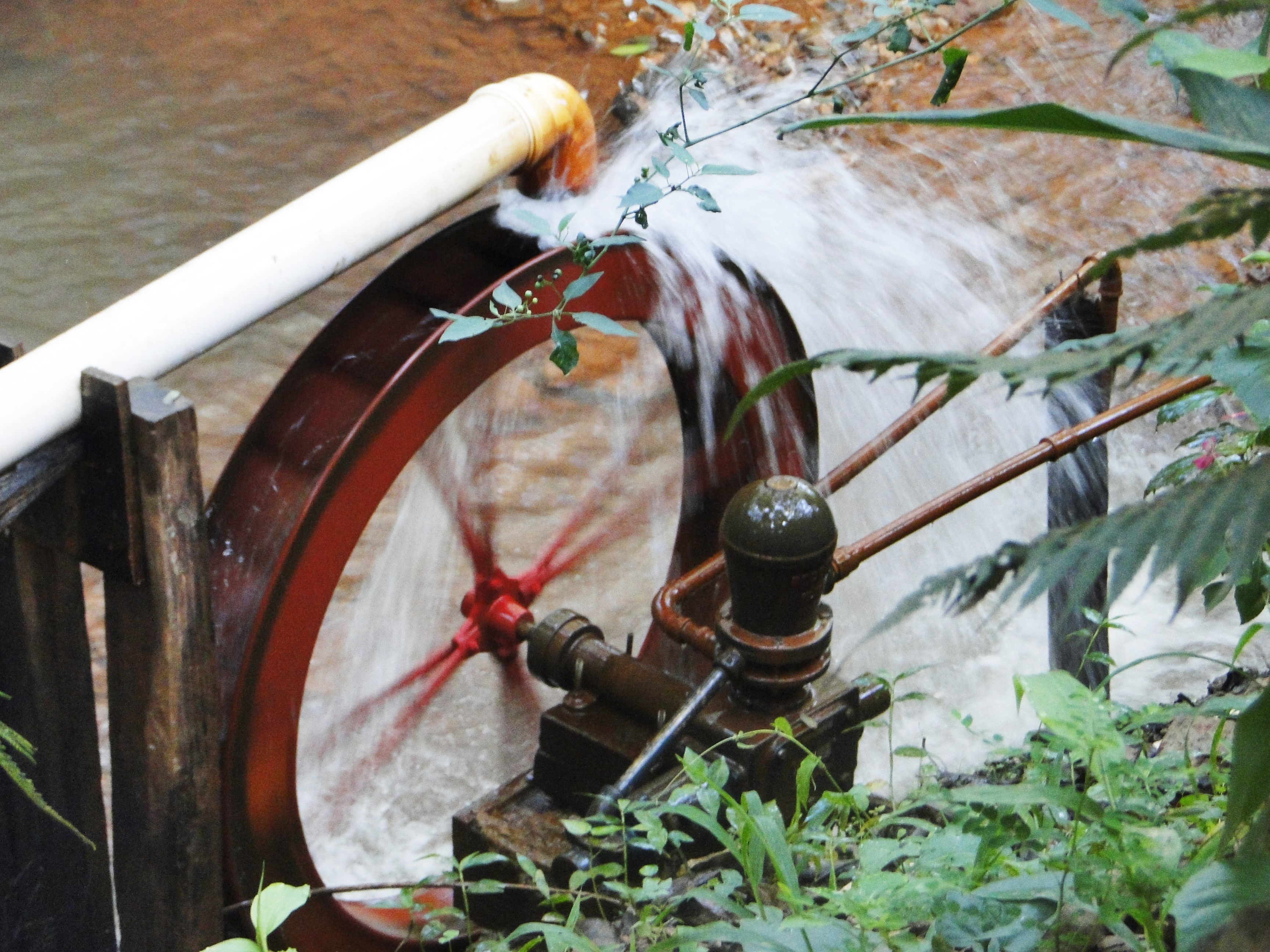 fundos do sitio em Minas